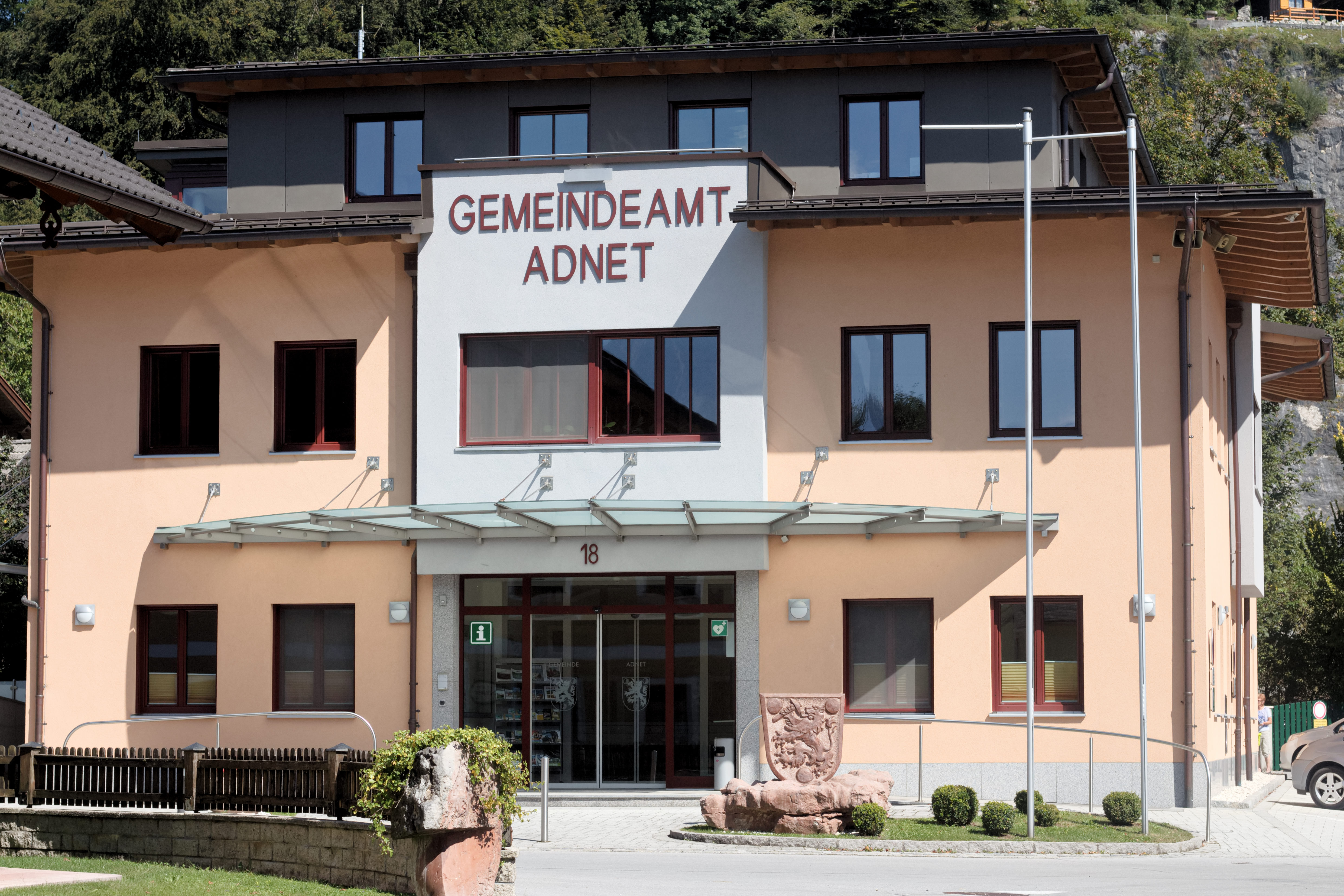 Gemeindeamt in Adnet, Bezirk Hallein, Land Salzburg, mit Touristeninformationsstelle; vor dem Gebäude ein Reliefstein mit dem Gemeindewappen.